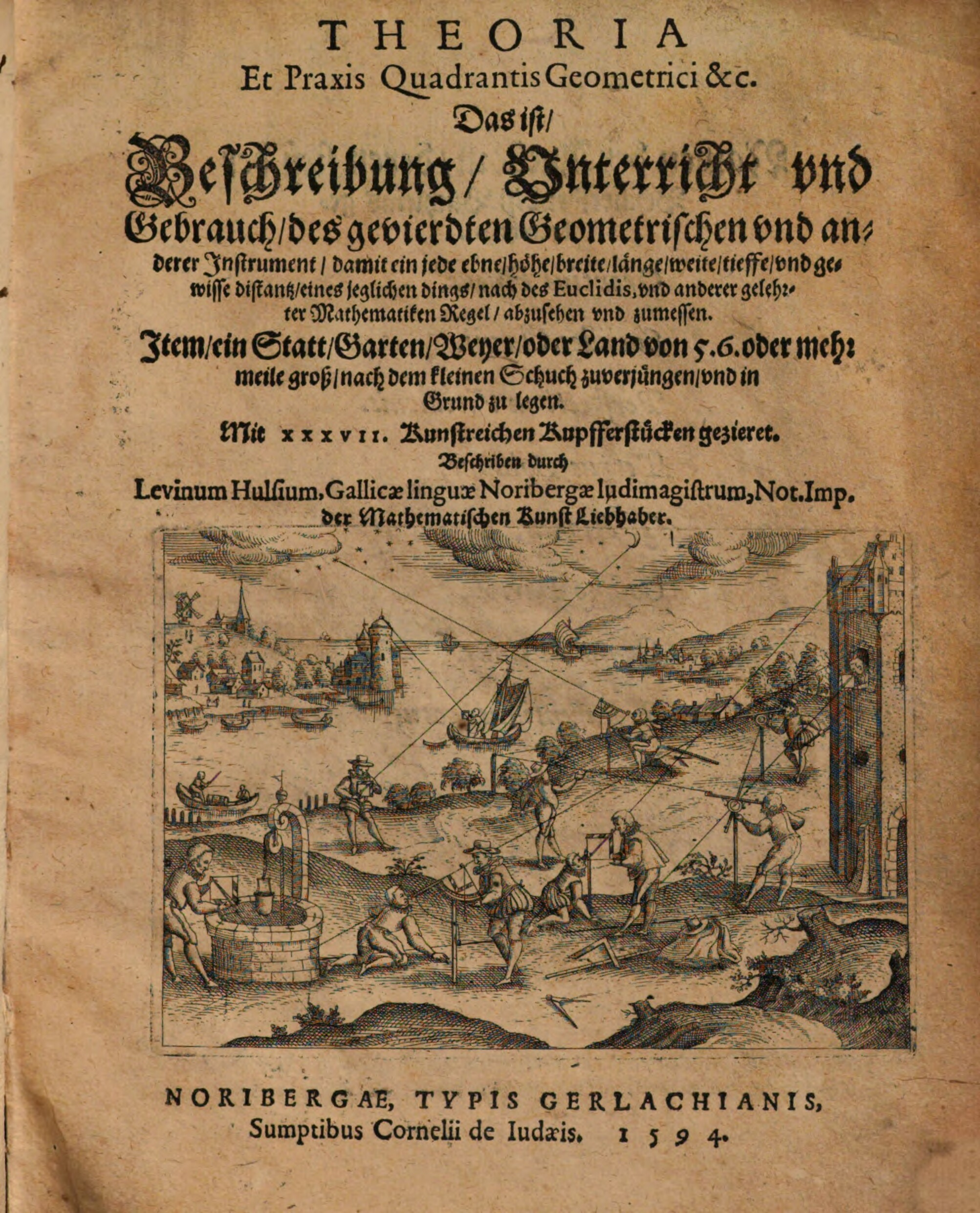 Titelkupfer von Cornelis de Jode, Theoria Et Praxis Quadrantis Geometrici &c. Das ist Beschreibung, Unterricht und Gebrauch des gevierdten Geometrischen und anderer Instrument […] (Nürnberg 1594)